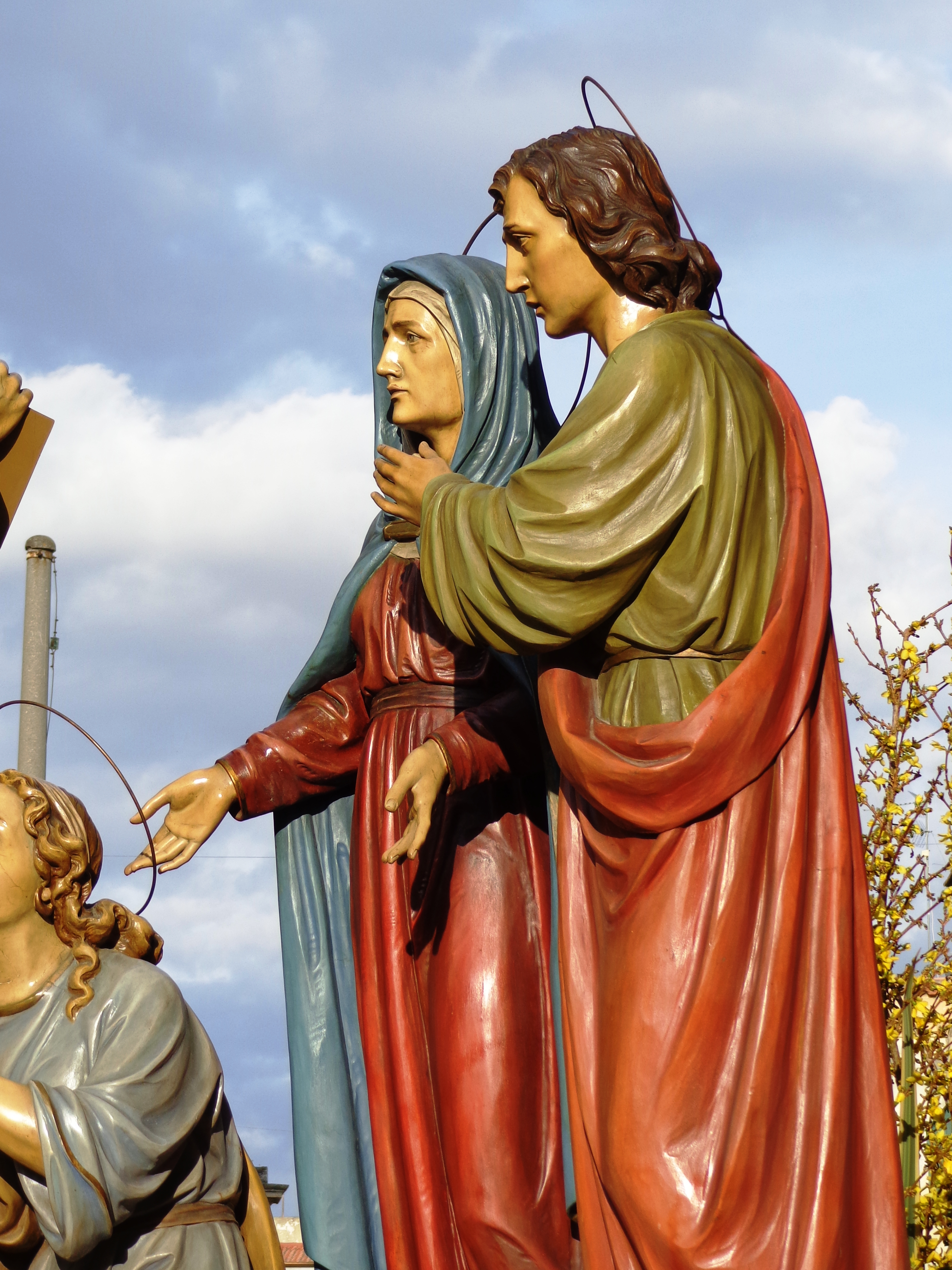 Vare 2014 tre